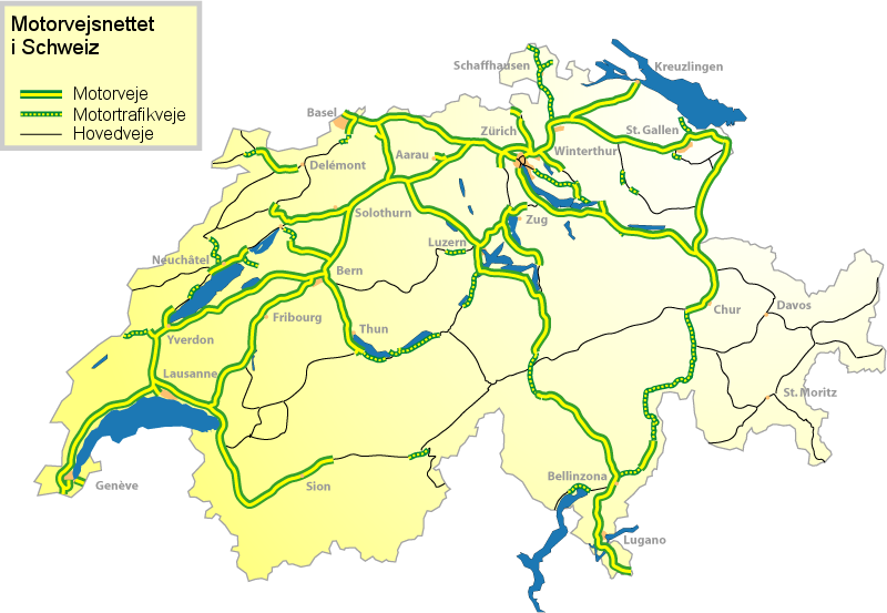 Motorvejsnet, Schweiz